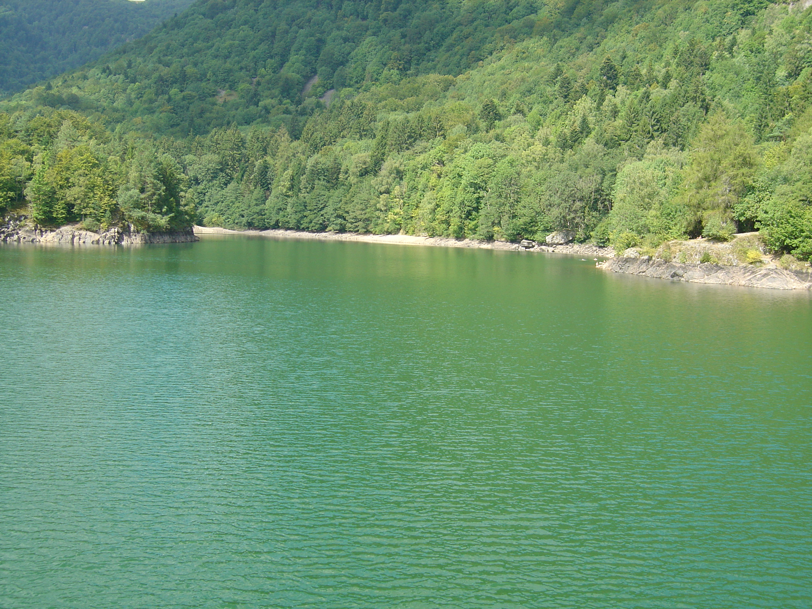 Lac d'Alfeld. PNR des Ballons des Vosges; Alsace; Haut-Rhin (68)